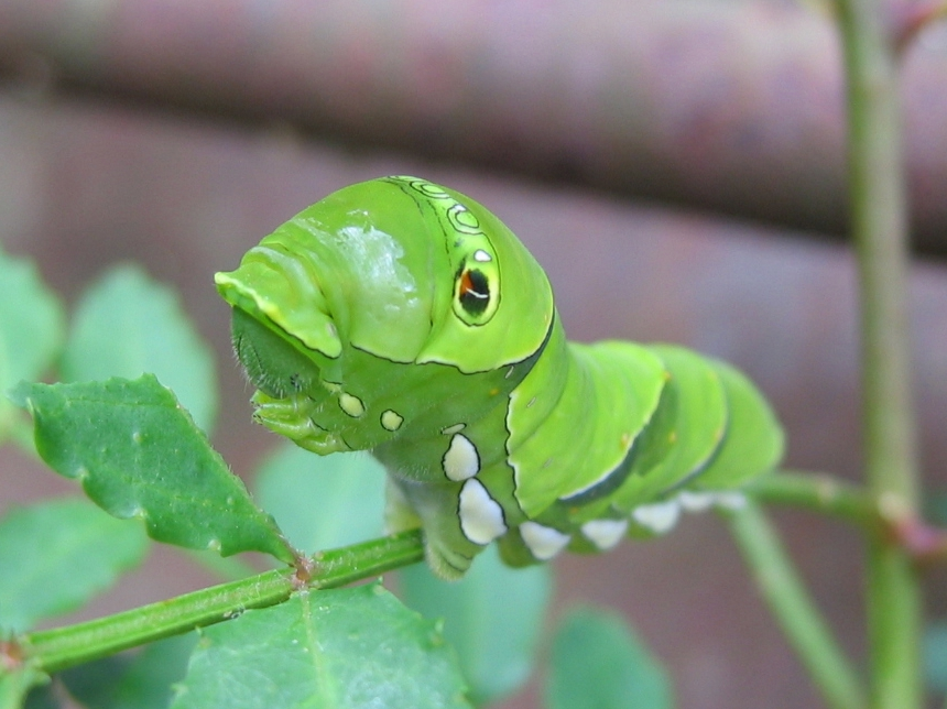 サンショウにつくアゲハの終齢幼虫